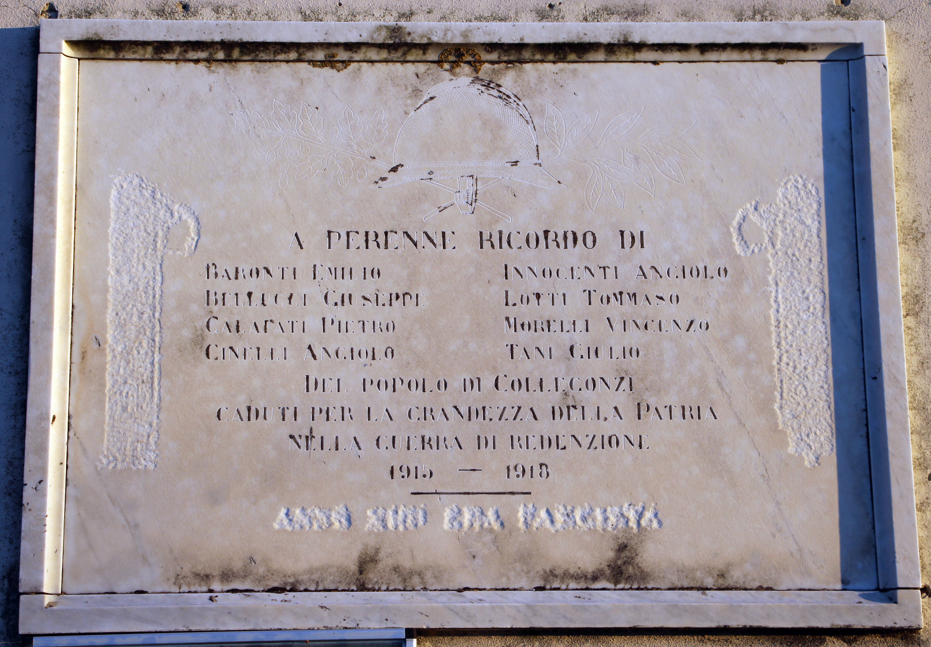 Vinci (FI)